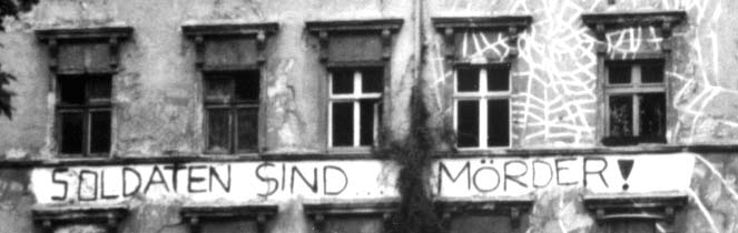 Ein Zitat von Kurt Tucholsky, aufgenommen an einer Hauswand in Berlin, ca. 1996